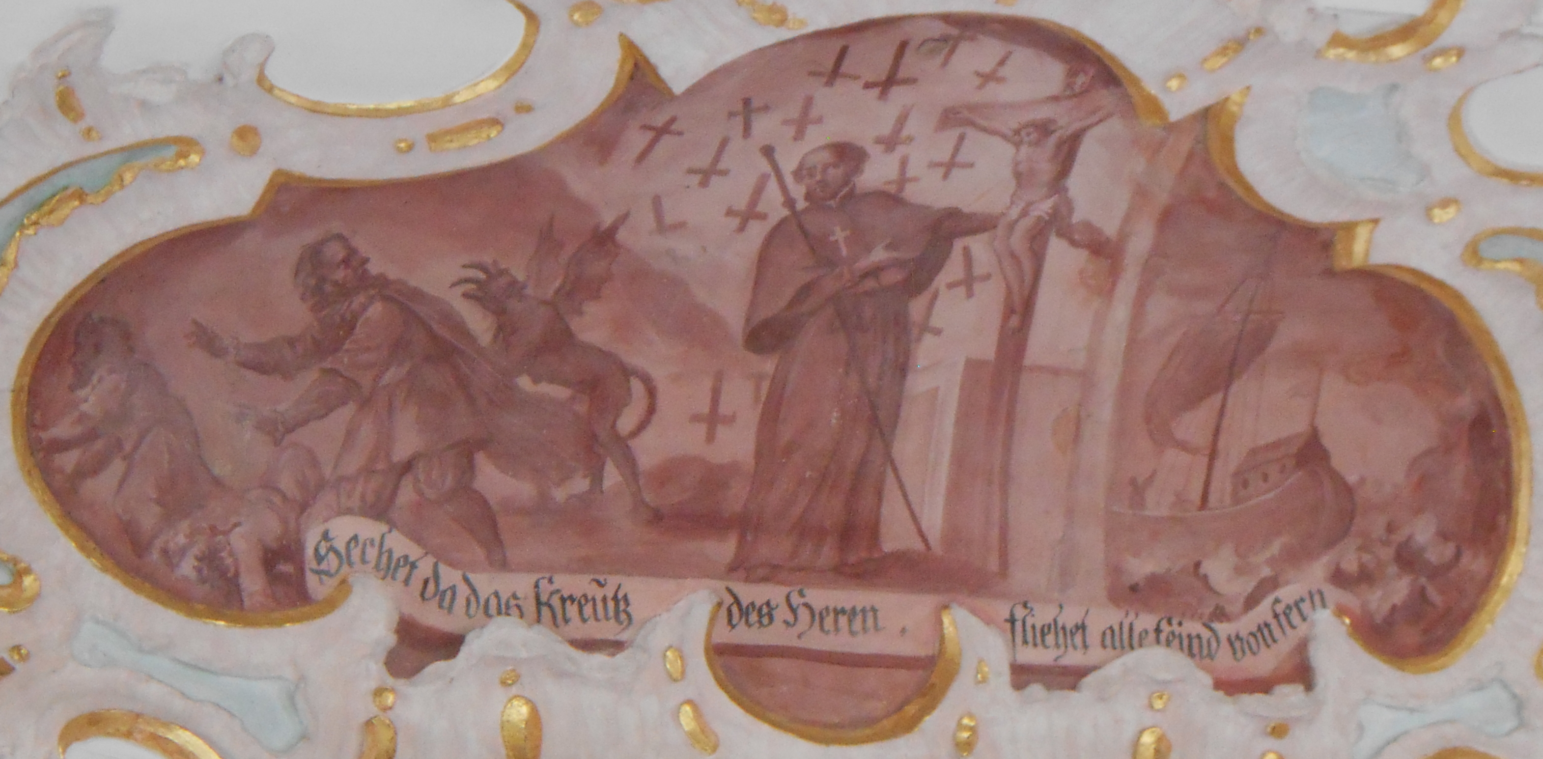 Deckengemälde von Heilig Kreuz (Mindelaltheim)